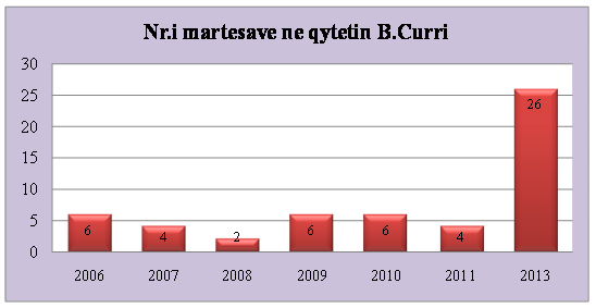 Numri i martesave ne qytetin e Bajram Currit